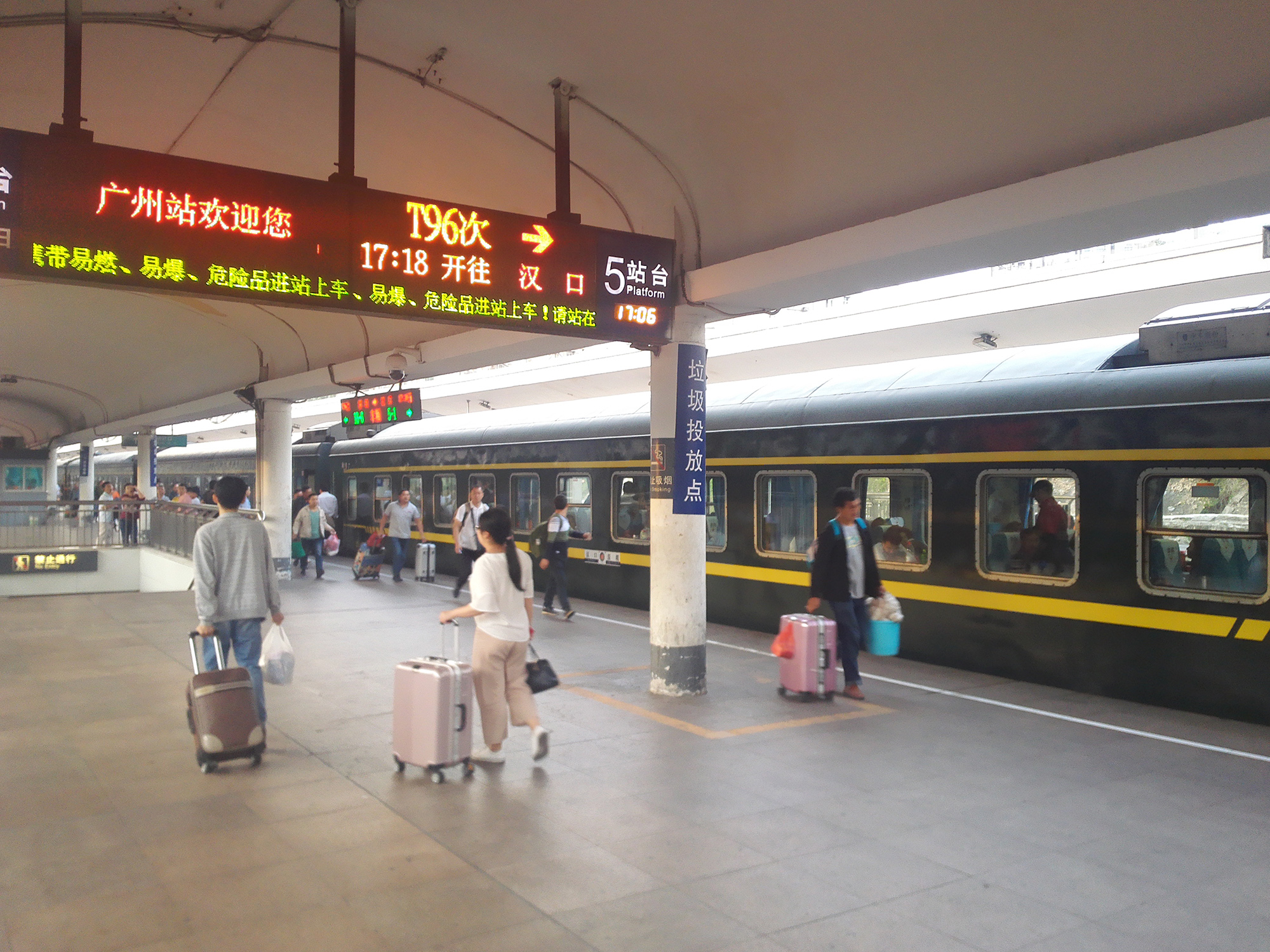 中文（中国大陆）: T96次列车停靠广州站